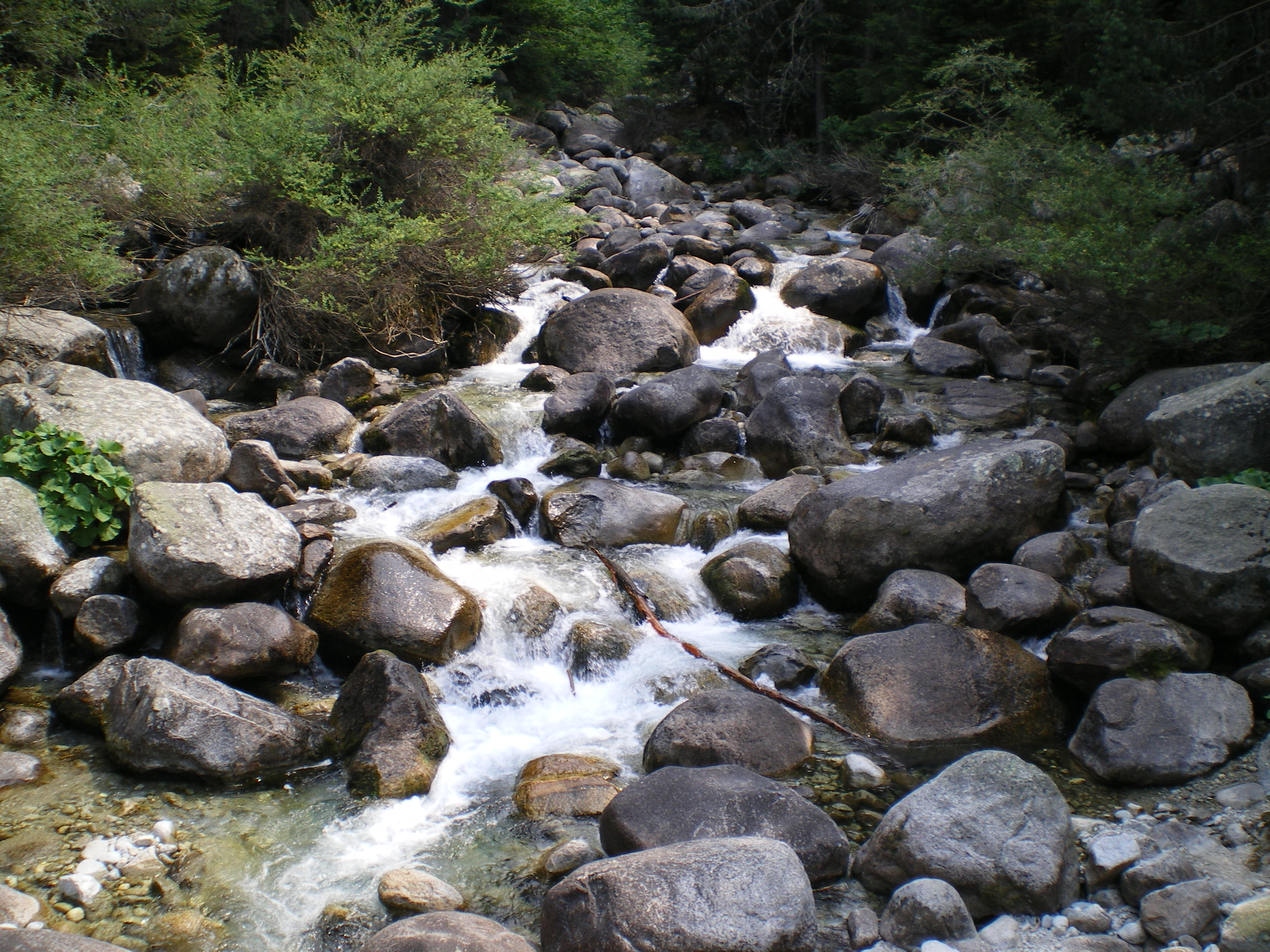 River Glazne, Pirin, Bulgaria